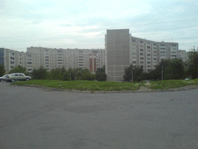 Buildings in ZhBI (Komsomolsky) region, Yekaterinburg, Russia